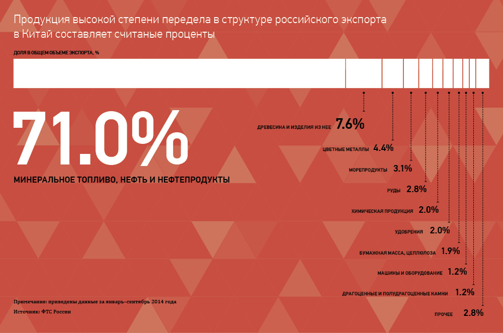 Структура российского экспорта в Китай (январь-сентябрь 2014)